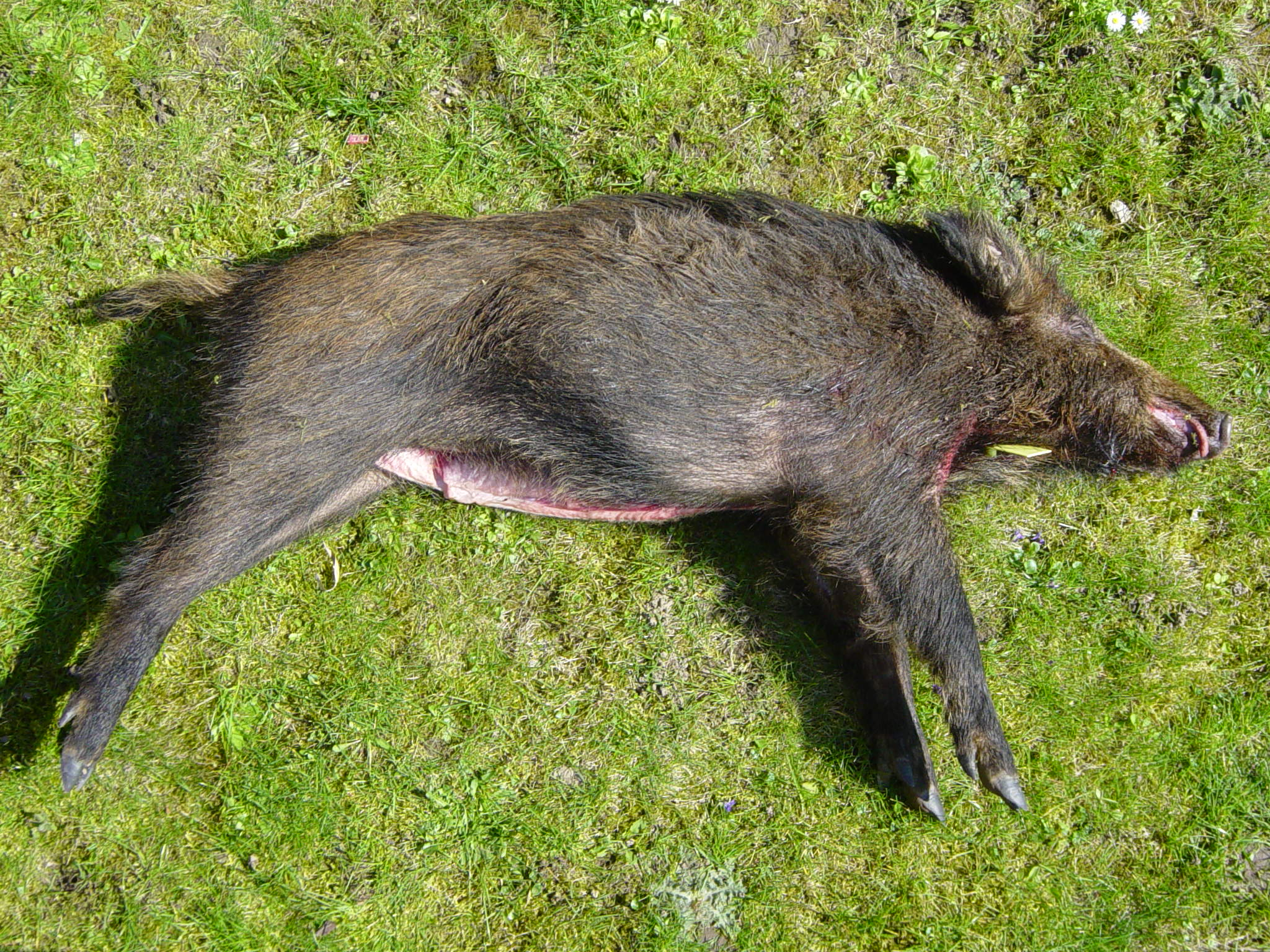 Wildschwein, einjährig, bereits ausgenommen